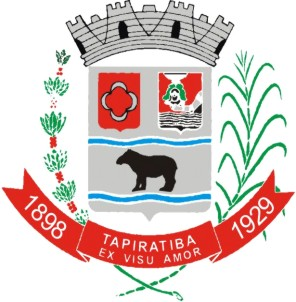 Brasão de cidade de Tapiratipa, SP